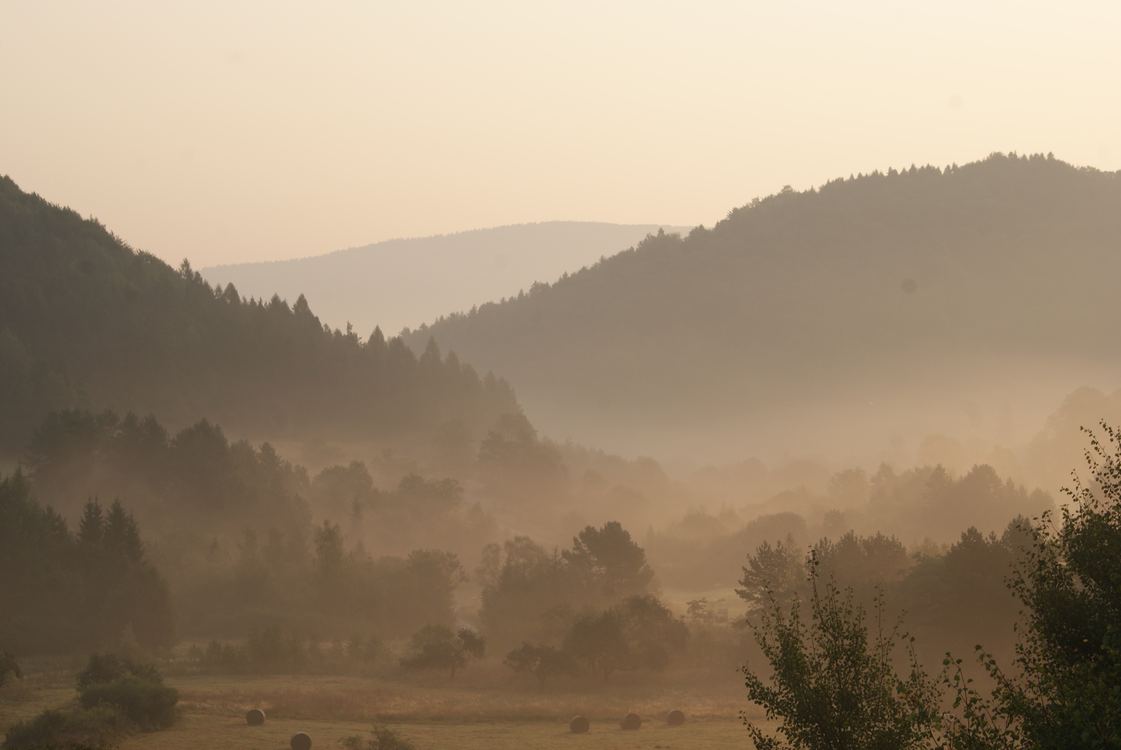 Obszar specjalnej ochrony ptaków Beskid Niski. This is a photography of Natura 2000 protected area with ID PLB180002